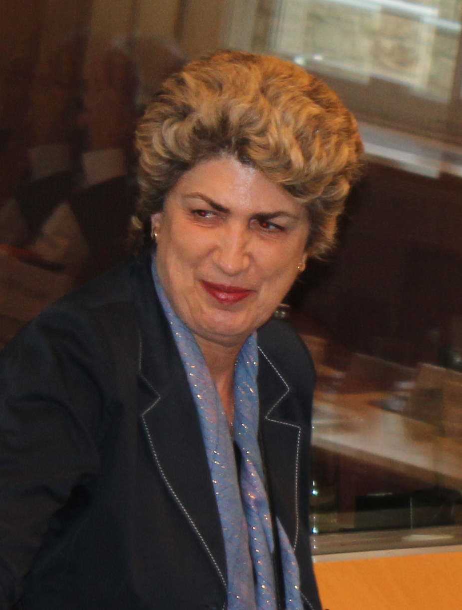 Maria João Rodrigues